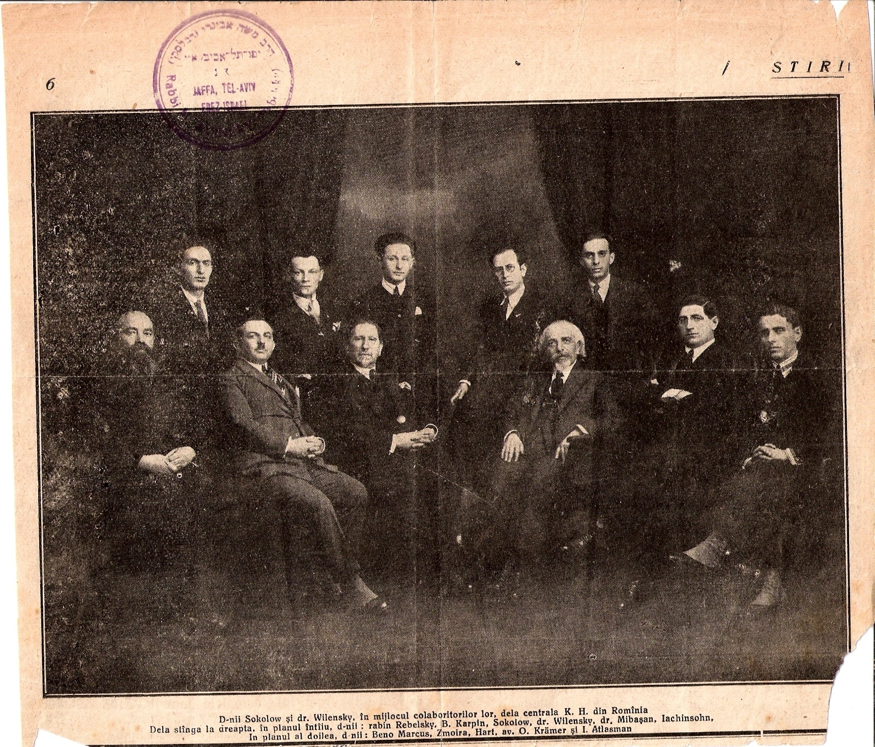 הרב משה רבלסקי(אבינרי)